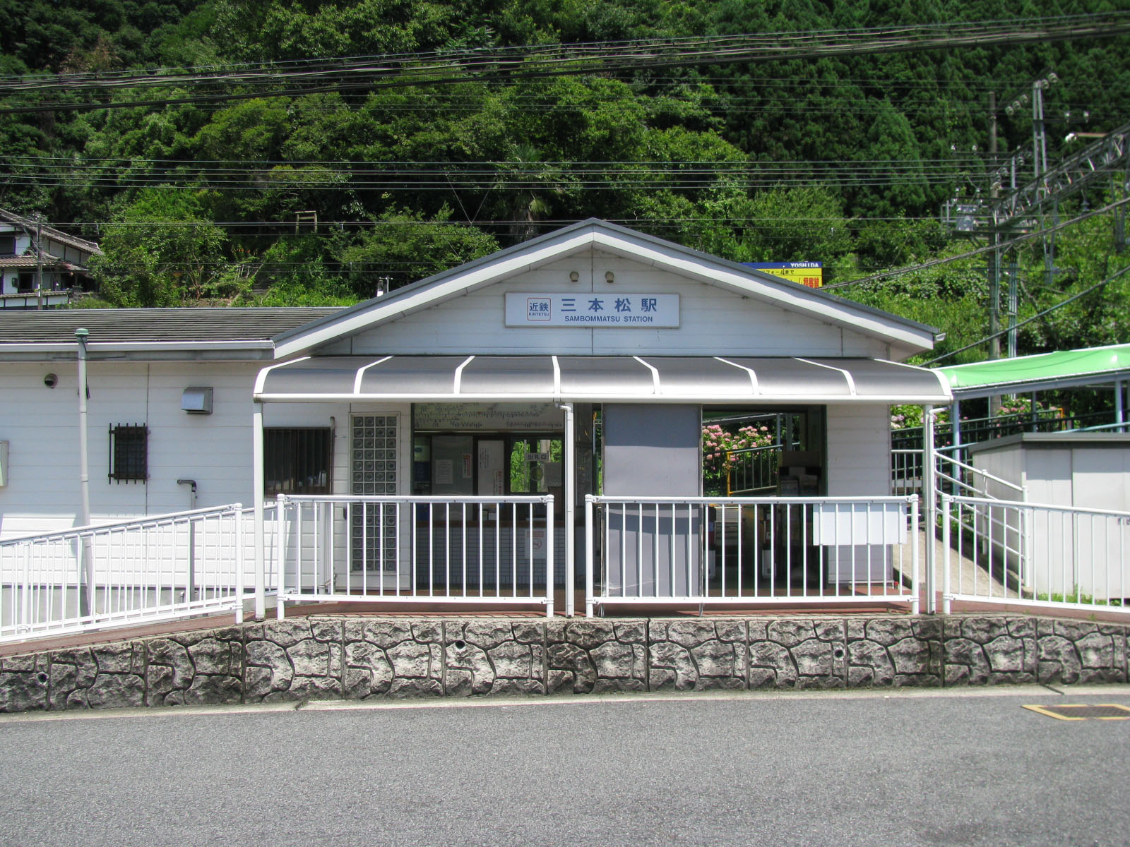 近鉄三本松駅